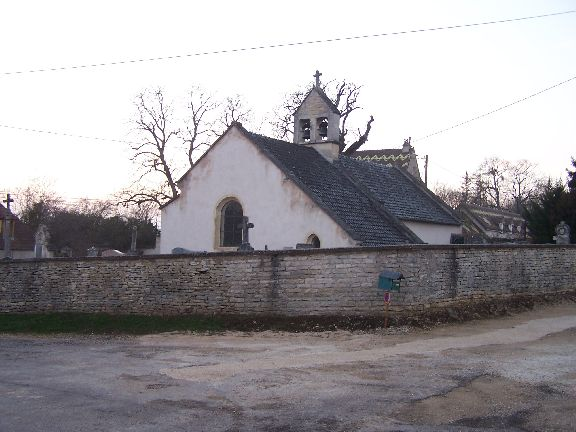 église de FLACEY (21)